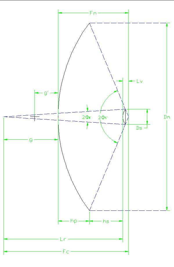 Configuración óptica general del radiotelescopio de 40 m de diámetro ARIES XXI del CAY, Yebes, provincia de Guadalajara, España [1]